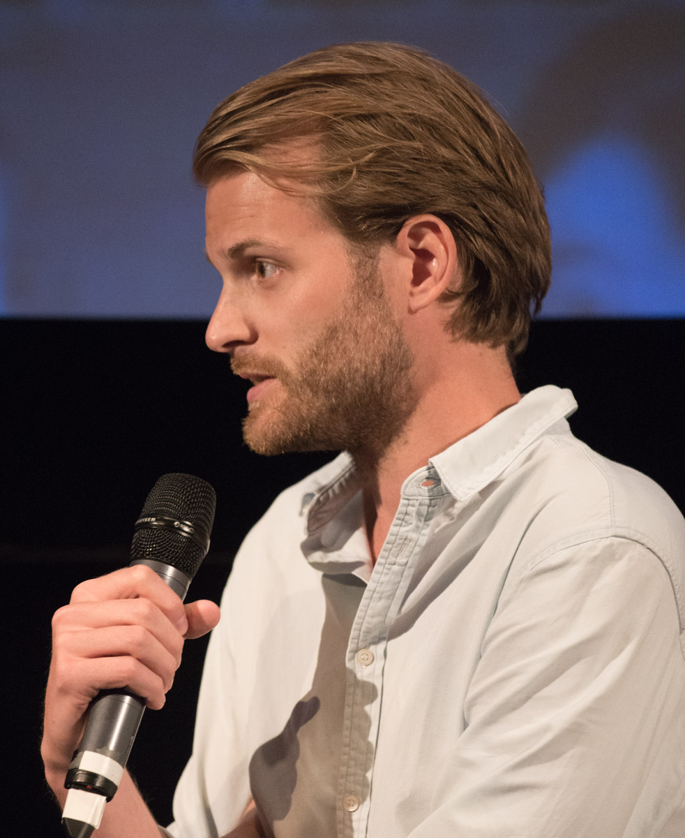 Magnus von Horn under presentationen av den Svenska filmhösten i Filmhuset i Stockholm den 17 augusti 2015.